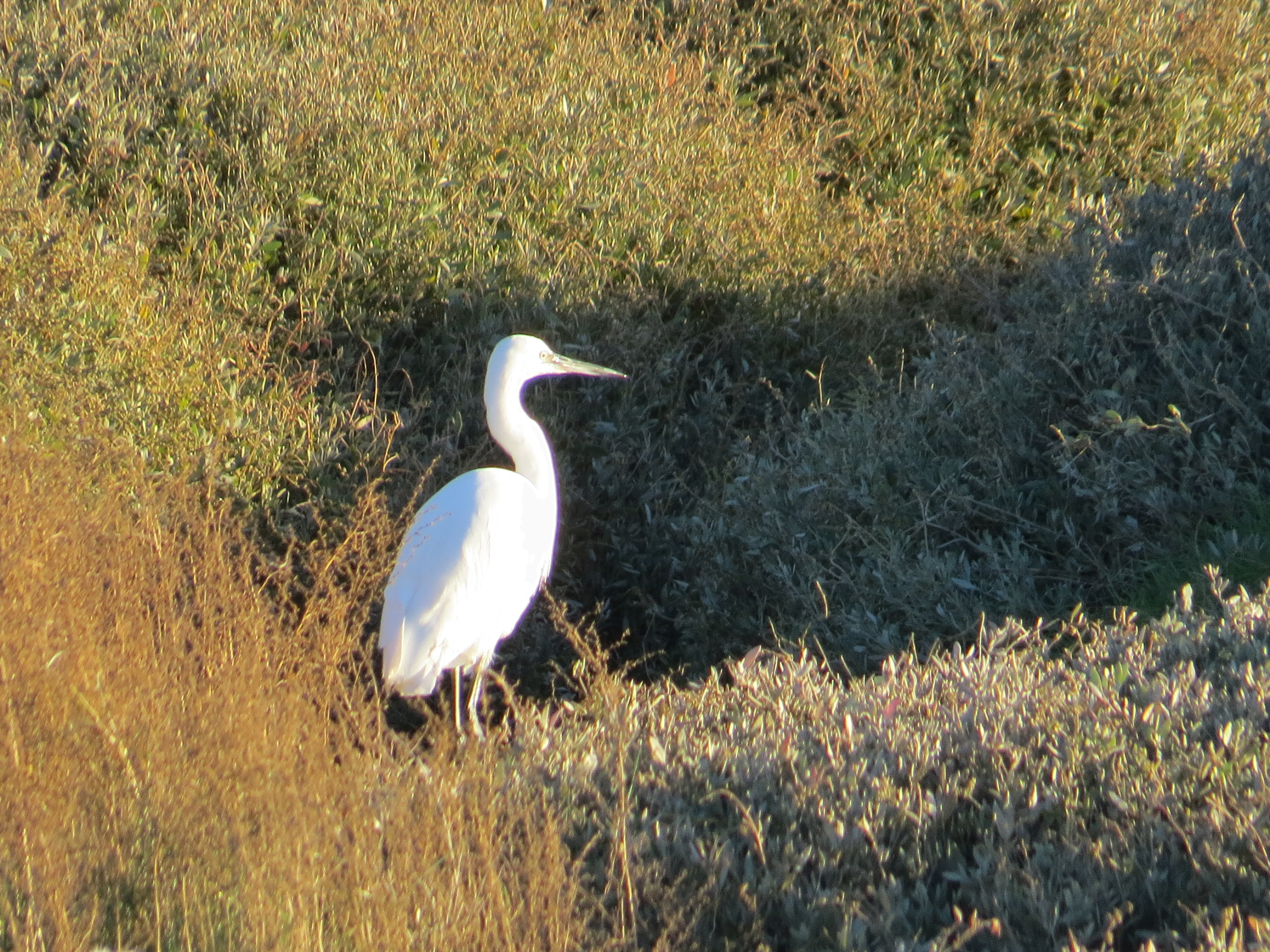 creyr bach copog o guddfan RSPB Parlwr Du